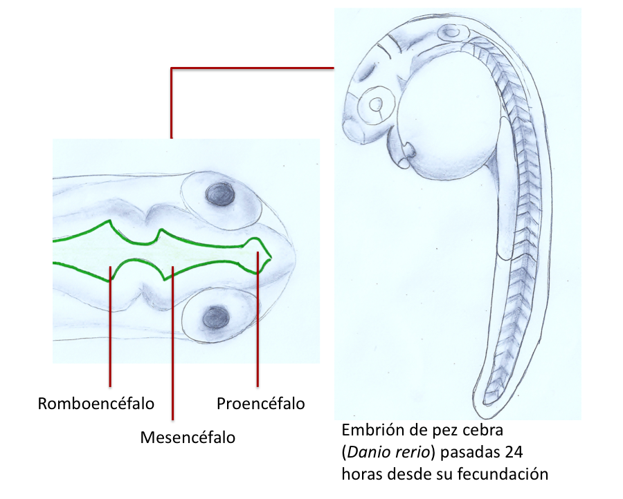 Cerebro temprano en pez cebra de 24 horas de vida.